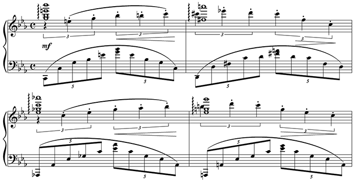 Рахманинов. 2-й фортепианный концерт (фрагмент; партия фортепиано). Пример использования в музыке особых видов ритмического деления (здесь — триолей и квинтолей)